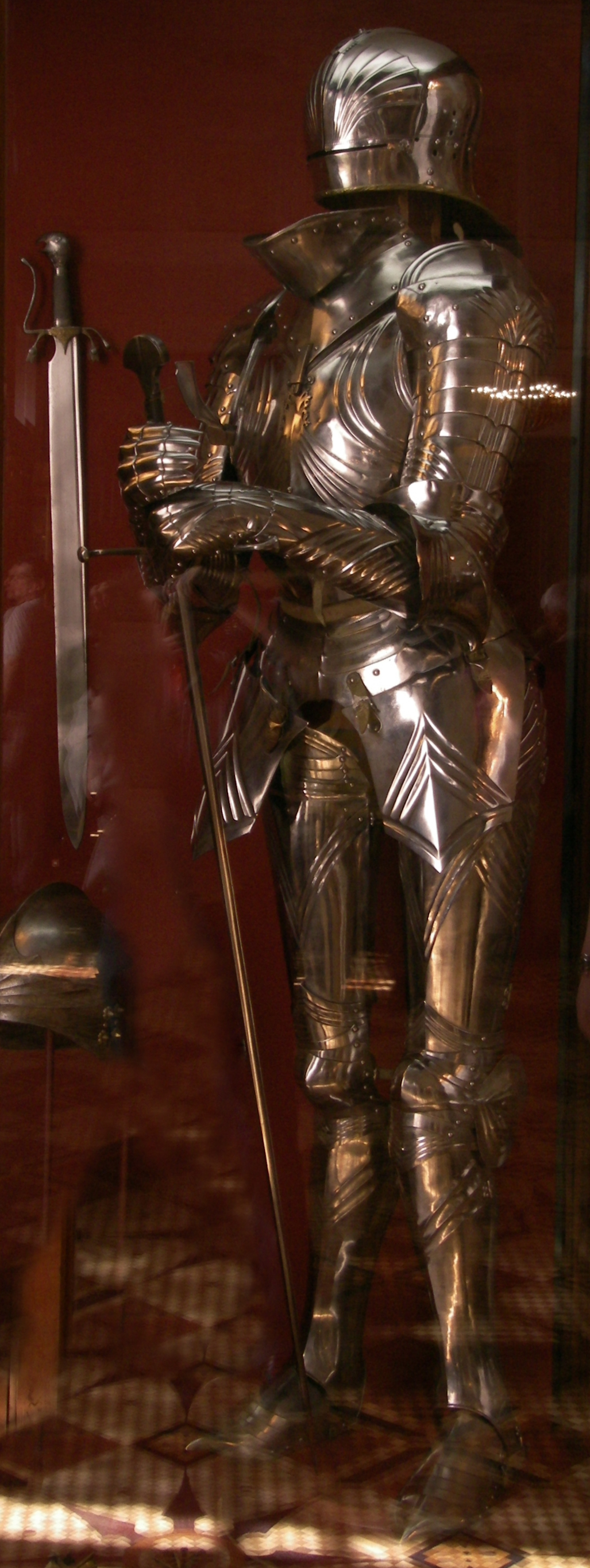 Готический доспех, Германия, Аугсбург, конец XV в. Мастер Л. Хельшмидт; Кончар, сер. XV в. Эрмитаж, Санкт-Петербург. Gothic armour by Lorenz Helmschmied